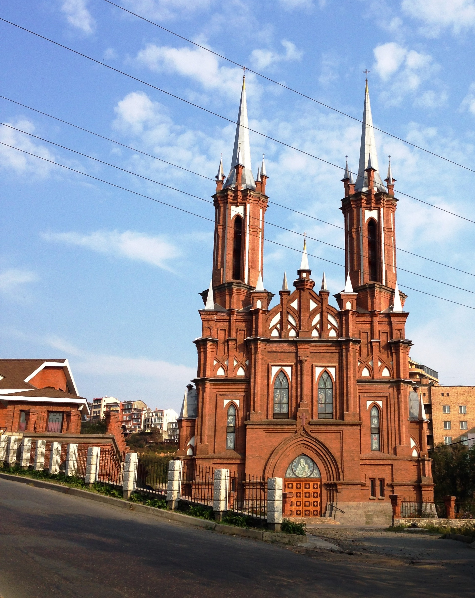 (Приморский край, Владивосток, улица Володарского, 22)